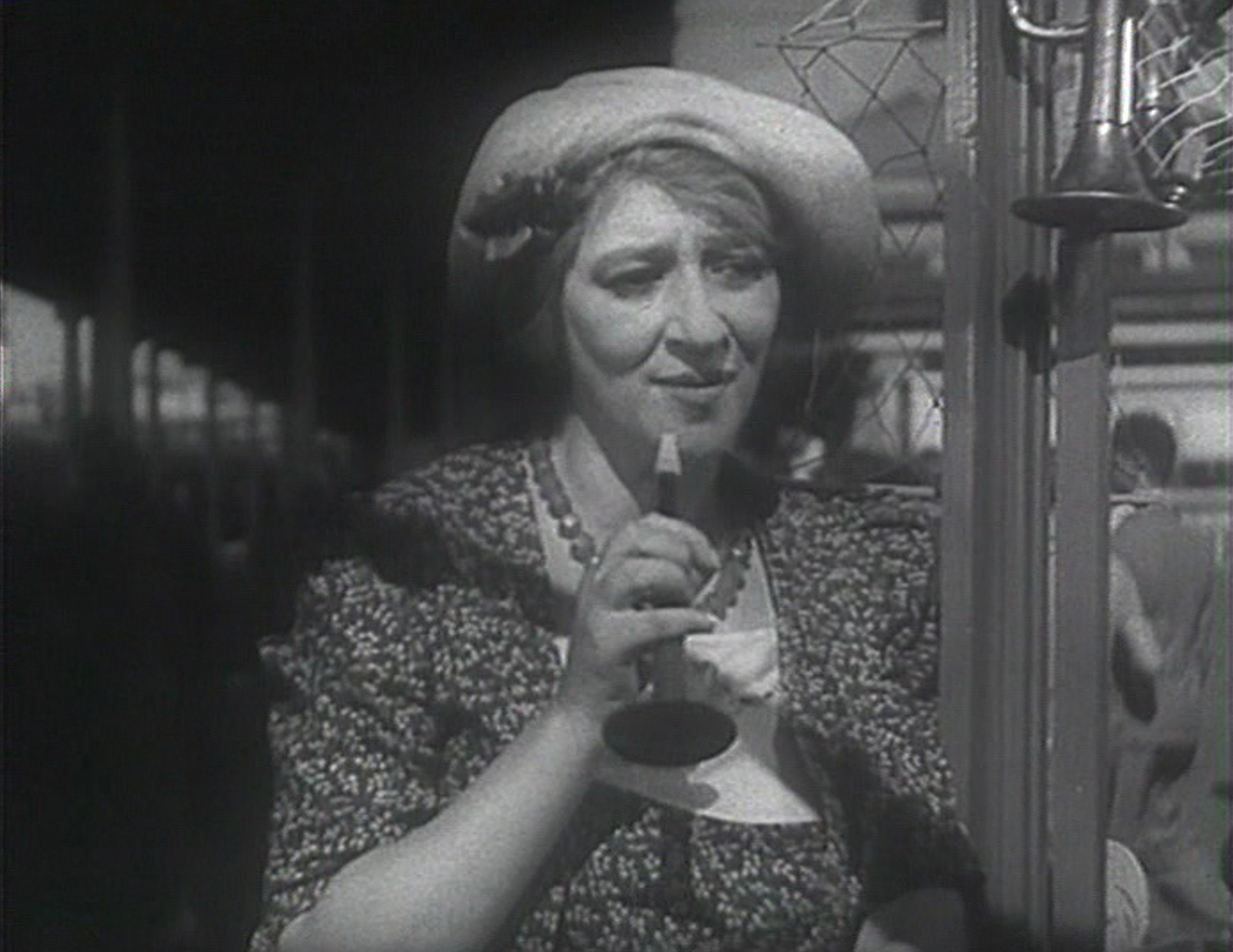 Подкидыш 1939, "Нет, мне мотив не нравится". Раневская